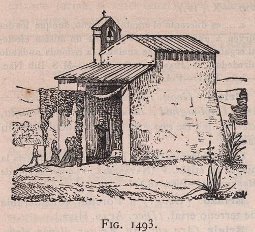 Figura 1493. Ermita.